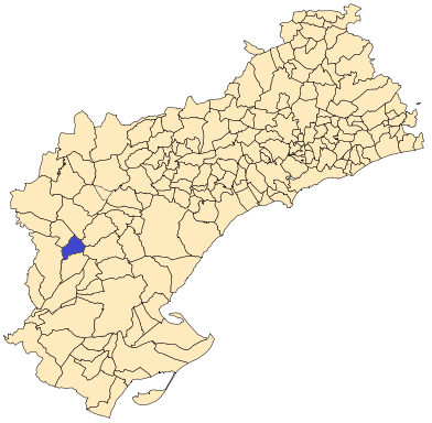 Situación de Prat de Comte en la provincia de Tarragona.